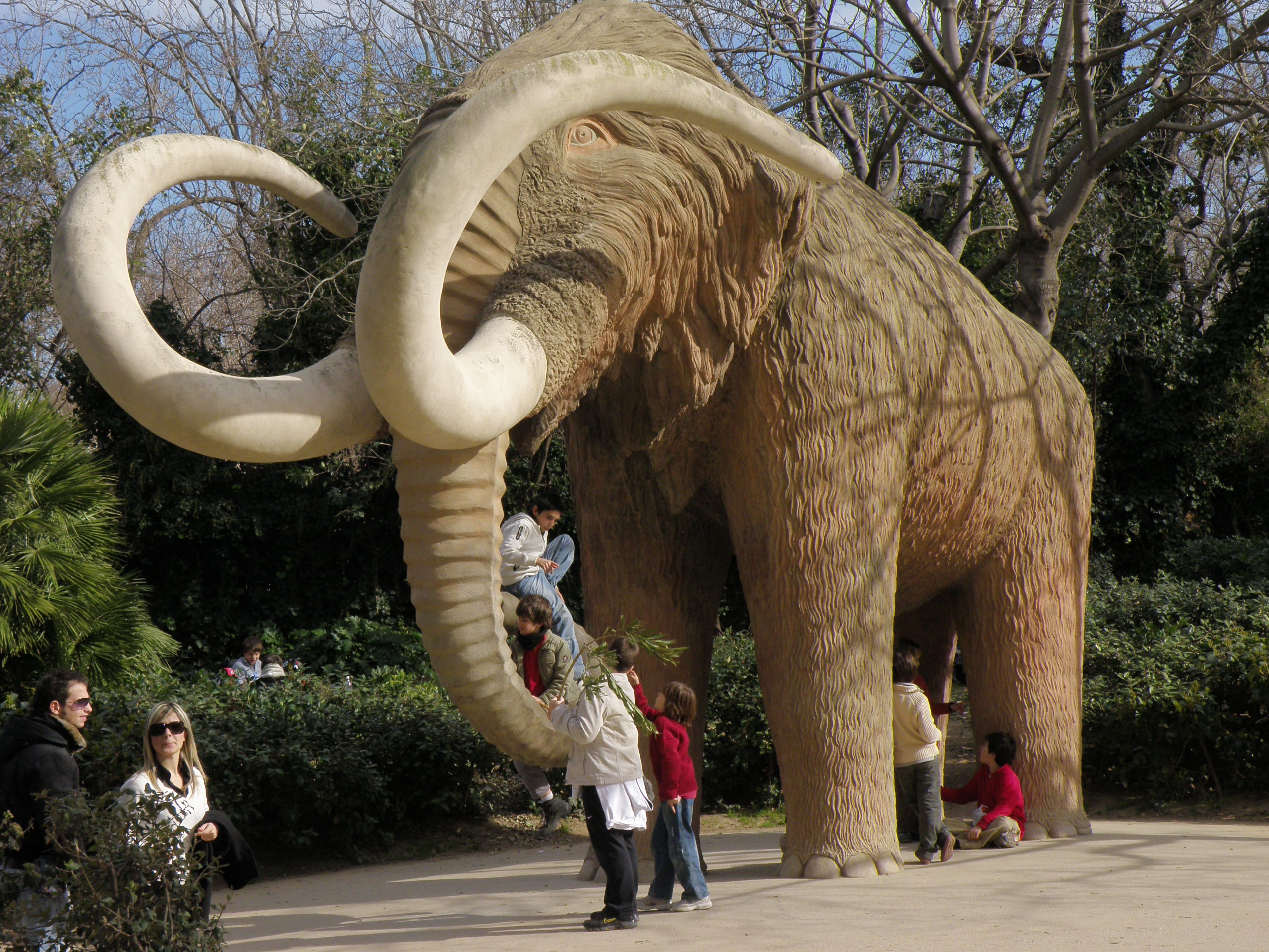 mamut en barcelona